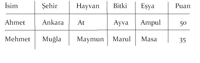 İsim-şehir oyununa grafiksel örnek.